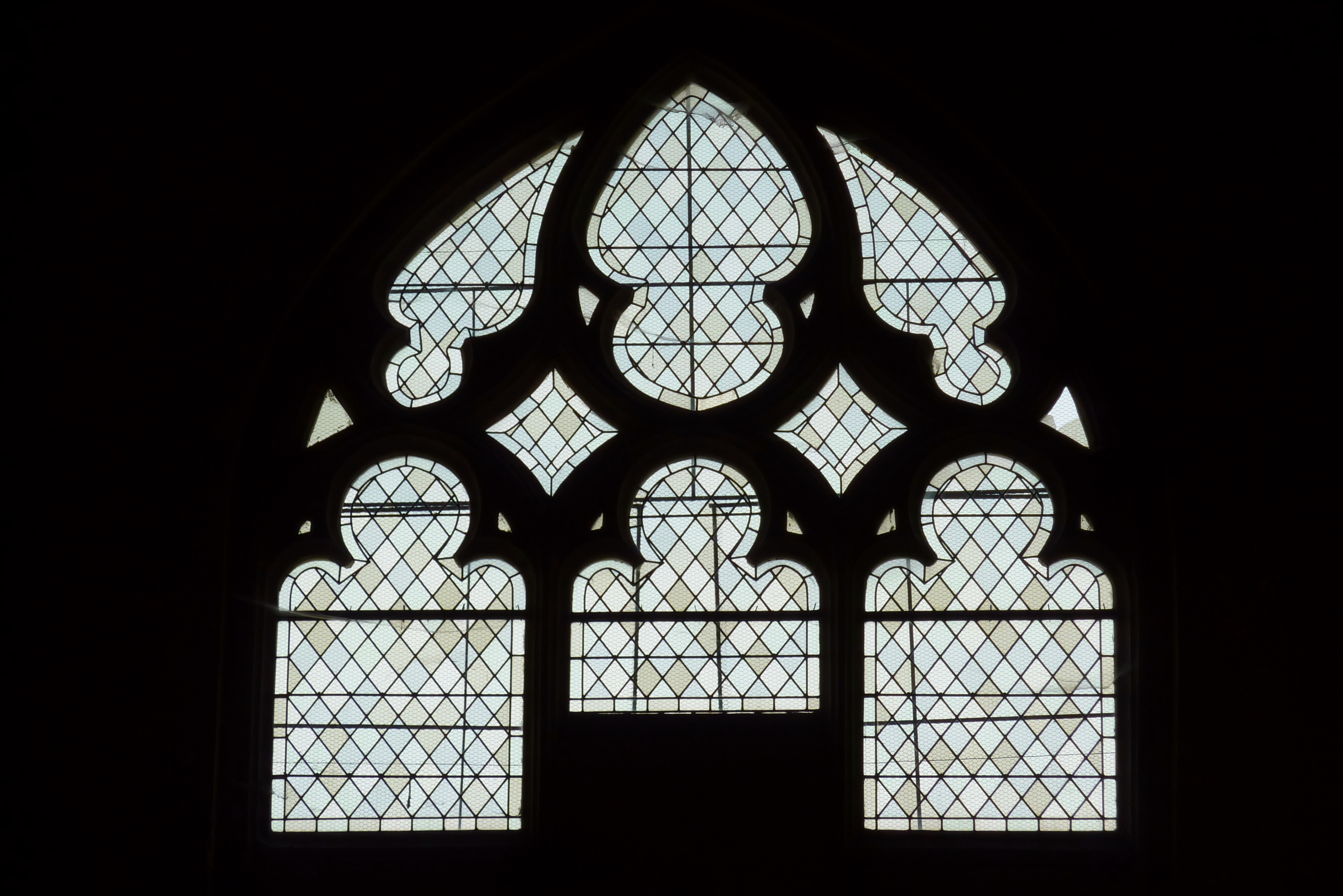 Katholische Pfarrkirche Saint-Germain in La Grande-Paroisse im Département Seine-et-Marne in der Region Île-de-France (Frankreich), Maßwerkfenster an der Westfassade